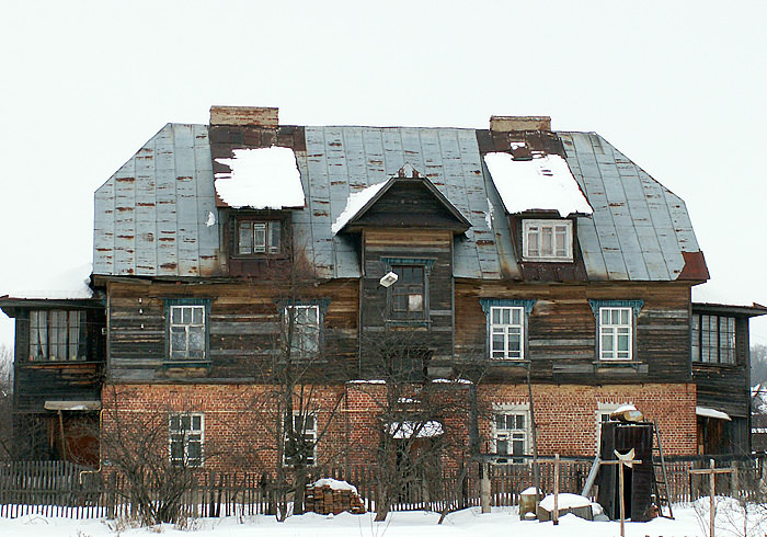 Кооперативный поселок в г. Вичуге (1925-1930)